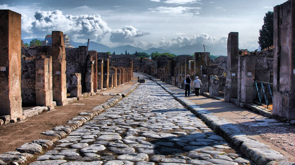 Pompei